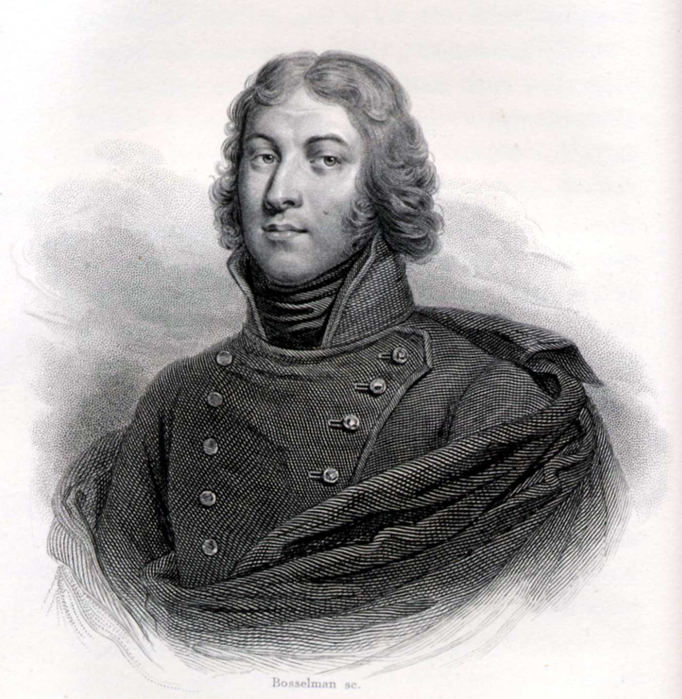 Louis-Lazare Hoche (* 25. Juni 1768 in Montreuil bei Versailles (heute quartier Montreuil); † 18./19. September 1797 in Wetzlar) war ein französischer General der Revolutionszeit, der durch sein besonnenes Handeln bei der Niederschlagung der Insurrektion in der Vendée 1795 als der "Pacificateur de la Vendée" bekannt wurde. Stich von Bosselman aus: Adolphe Thiers, Histoire de la Révolution française par M. A. Thiers, de l’Académie française (10 tomes), Paris, Furne et Cie Libraires-Éditeurs rue Saint-André-des-Arts 45, 1865